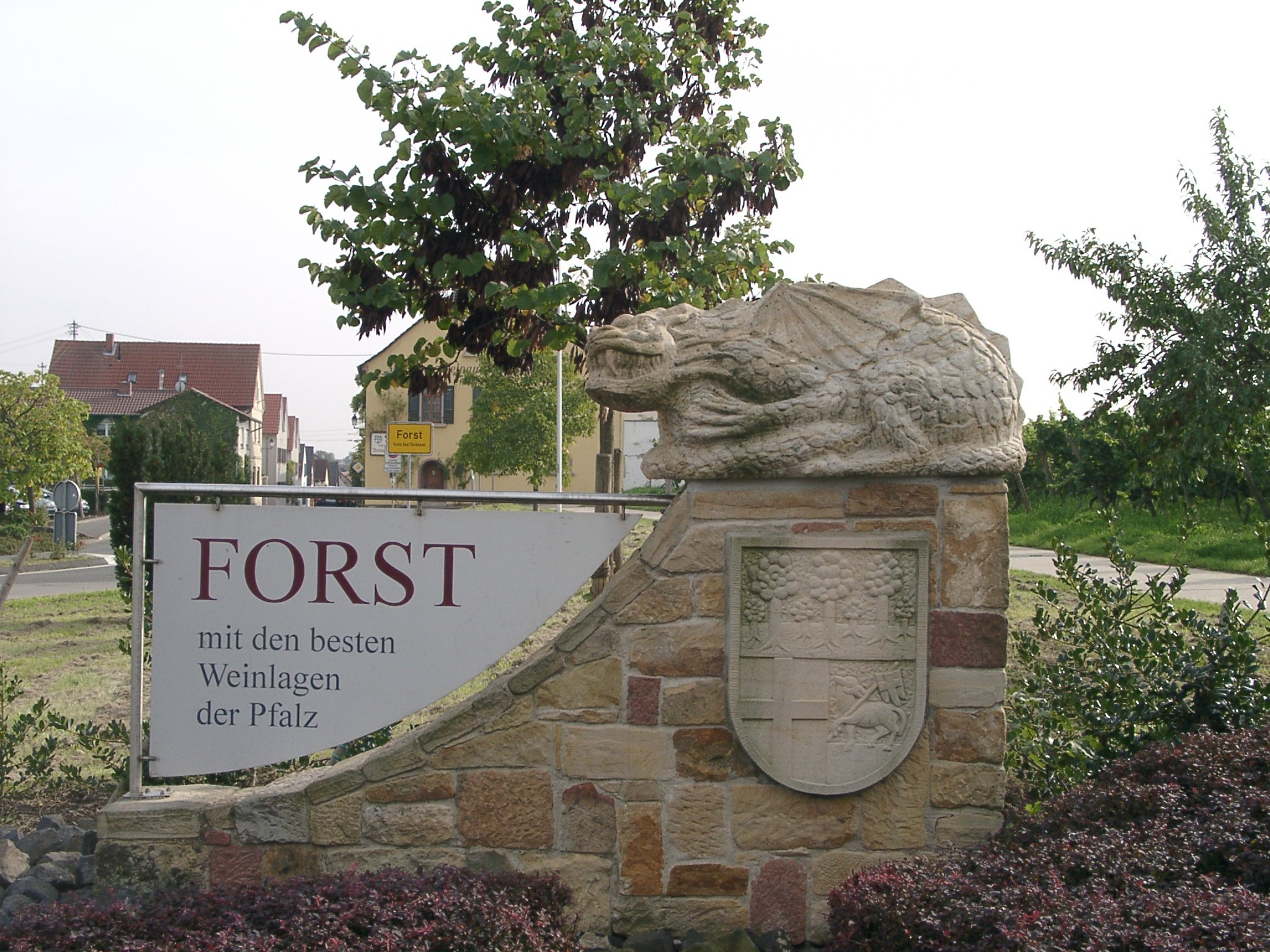 Zu sehen ist eine Skulptur des "Forster Ungeheuers", Wahrzeichen von Forsts berühmter Weinlage "Ungeheuer". Die Skulptur steht am nördlichen Ortsausgang von Forst.